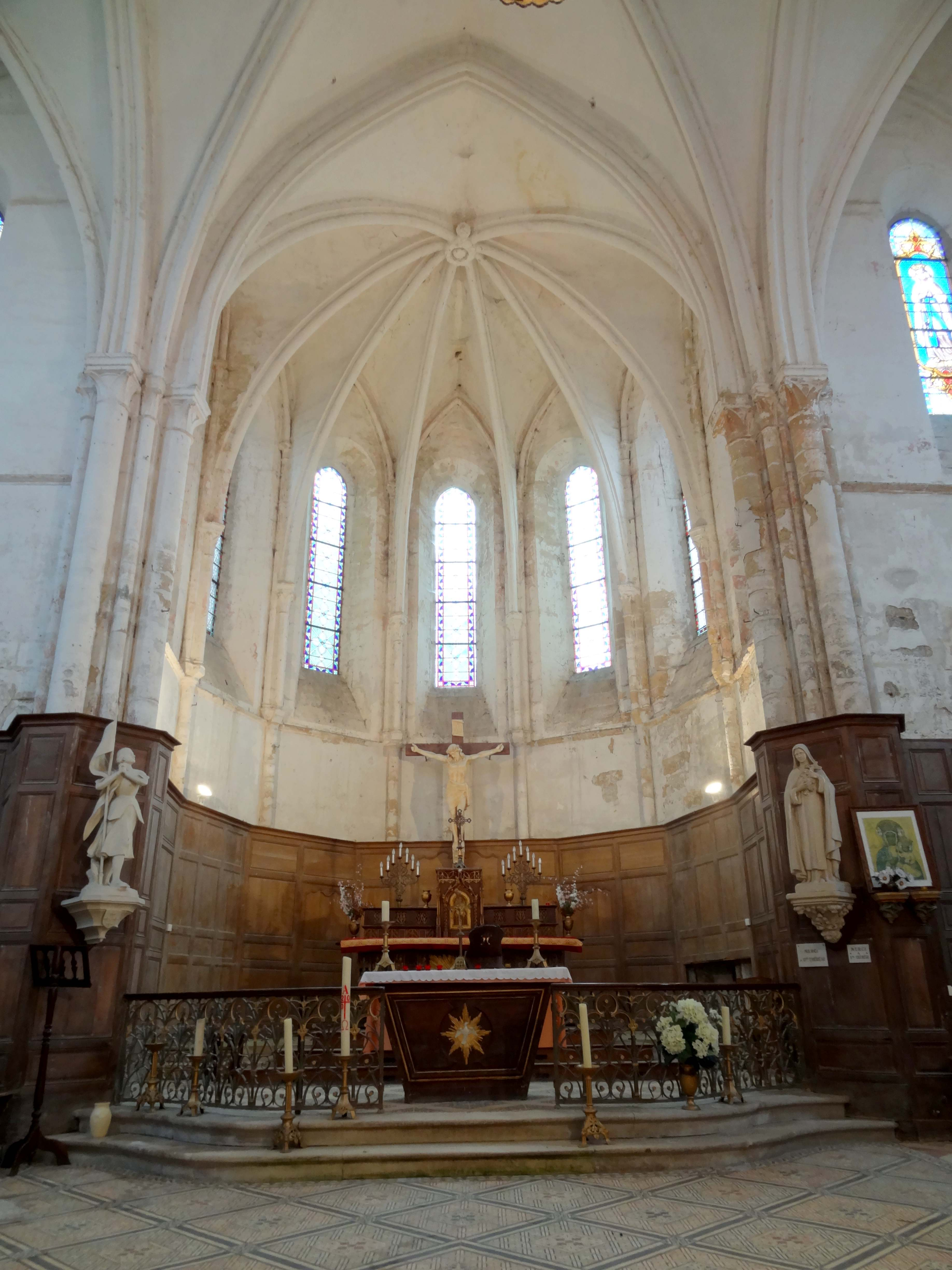 Intérieur de l'église - voir titre.